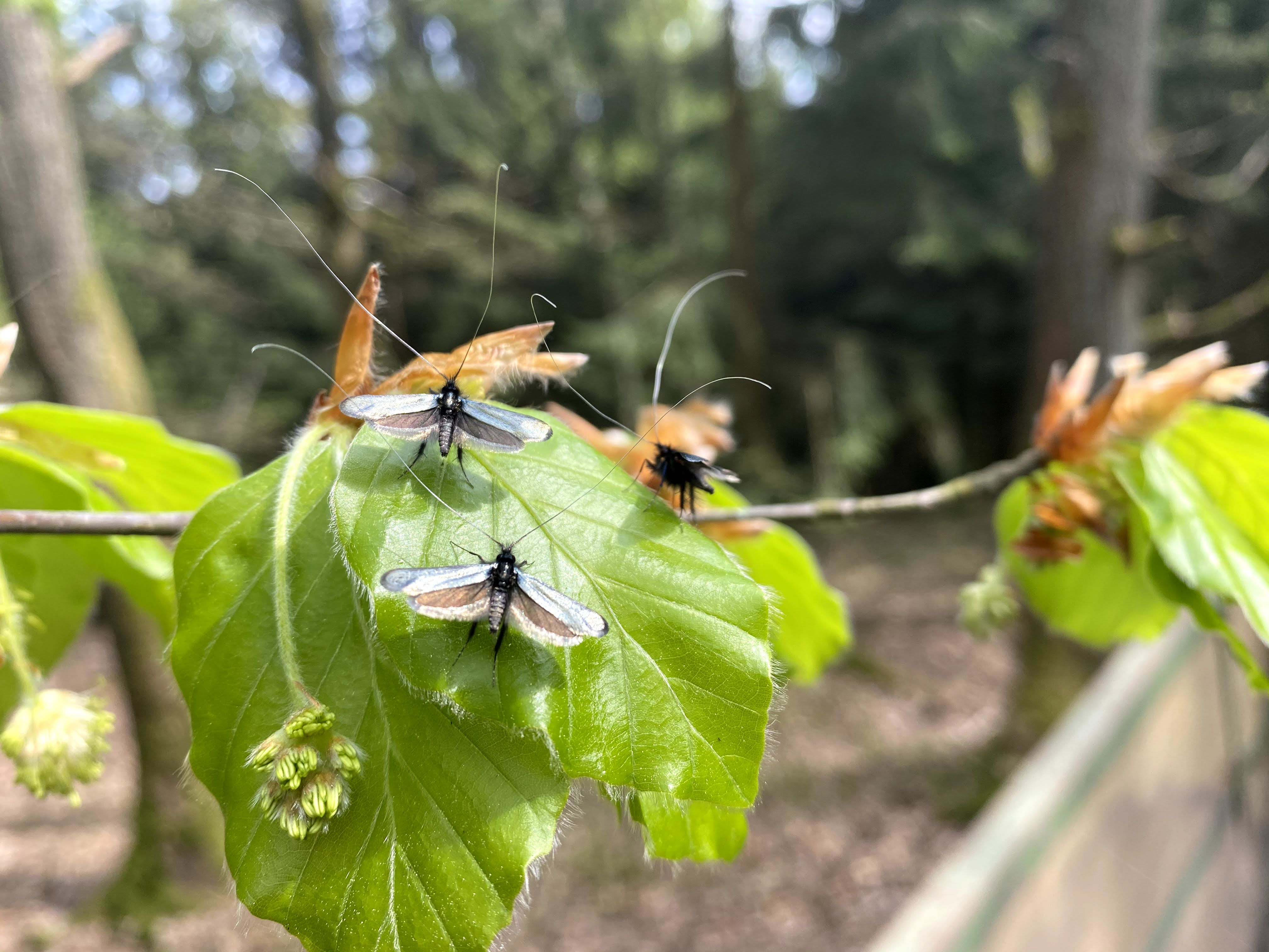 Eine Gruppe männlicher Adela reaumurella